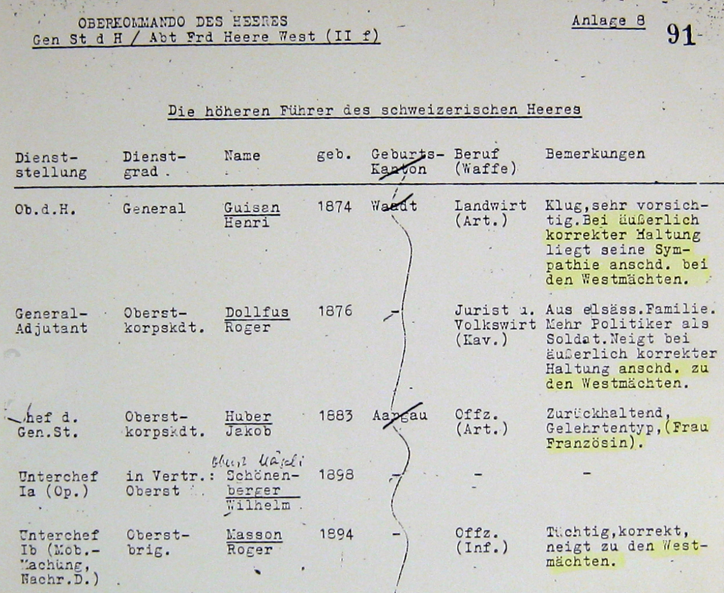 Einschätzung der dt. Wehrmacht über Gen Guisan, Faksimile im Festungsmuseum Reuenthal